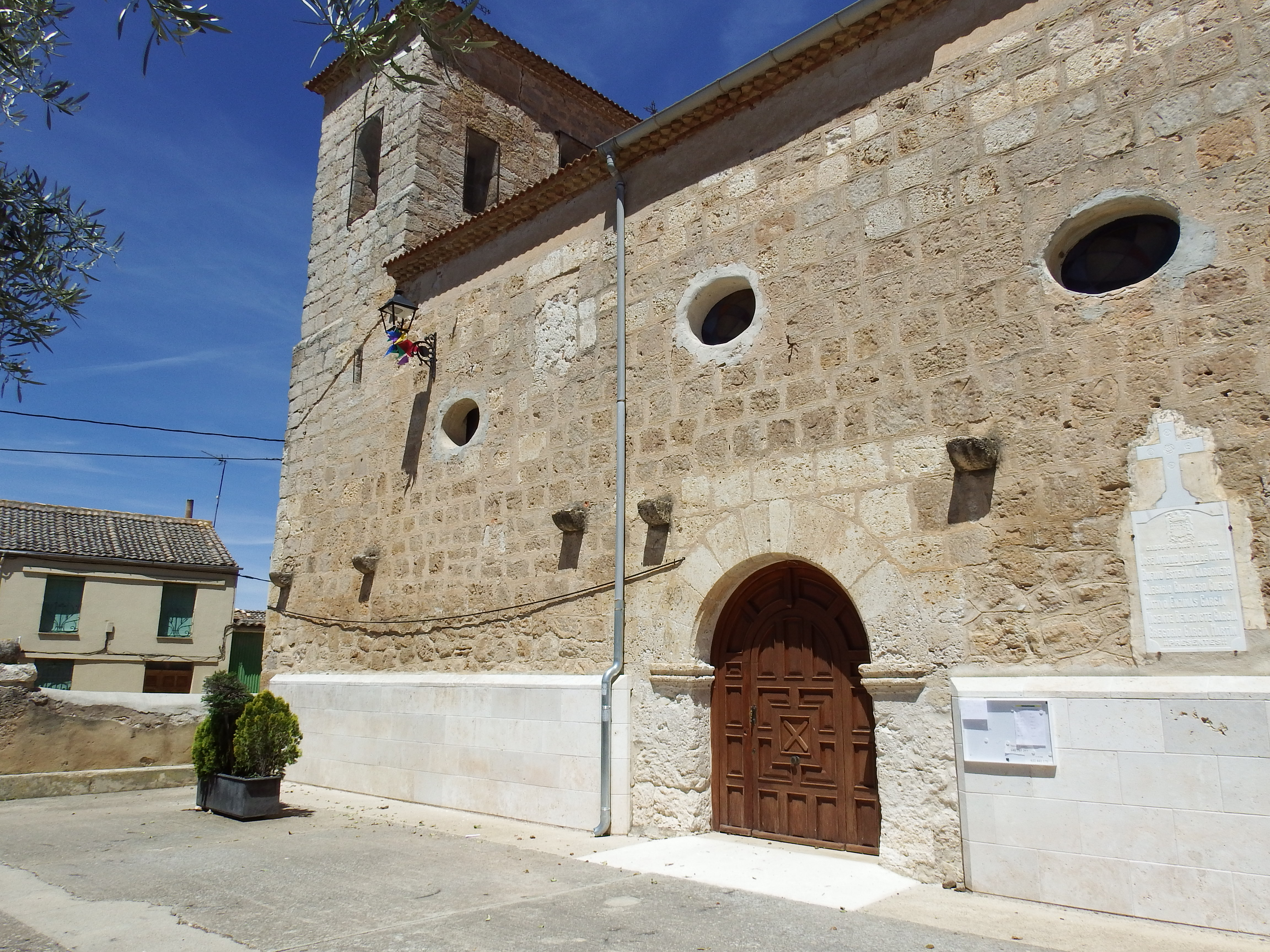 Iglesia de Berlangas de Roa